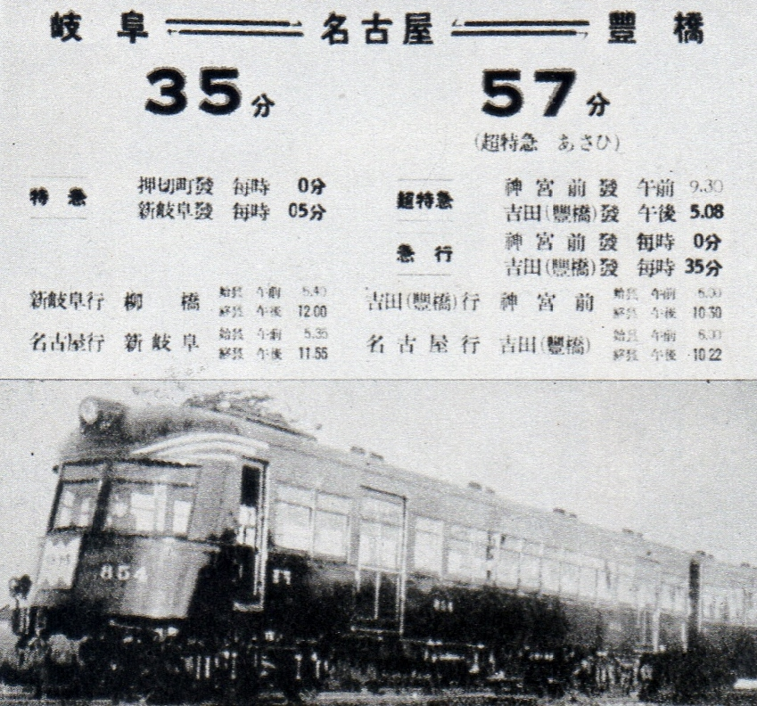 名古屋鉄道発足当時の沿線案内（柳橋駅（1941年廃止）営業時代）。